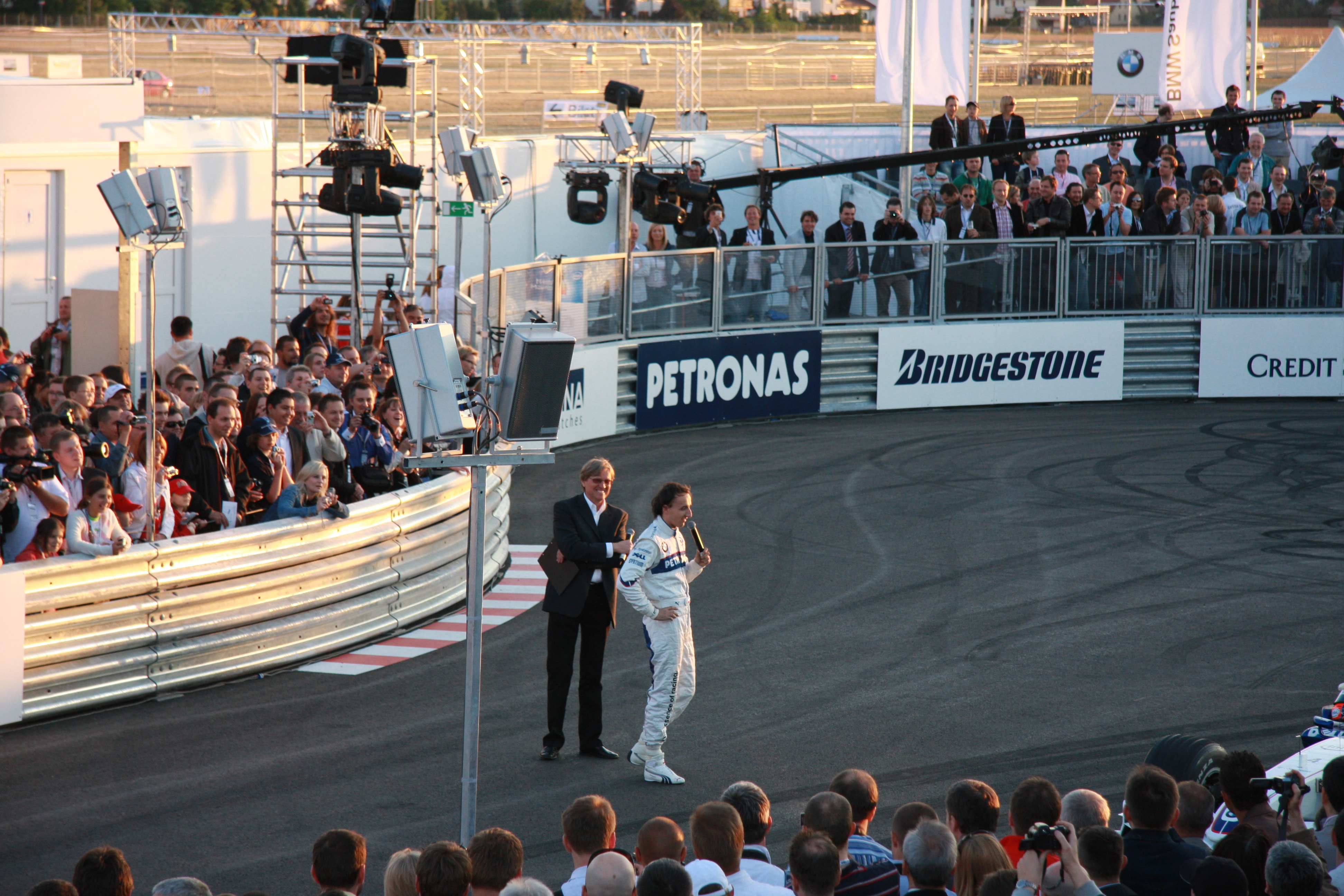 Zdjęcie nr 1 z PitLanePark na Bemowie 15.06.2008r.